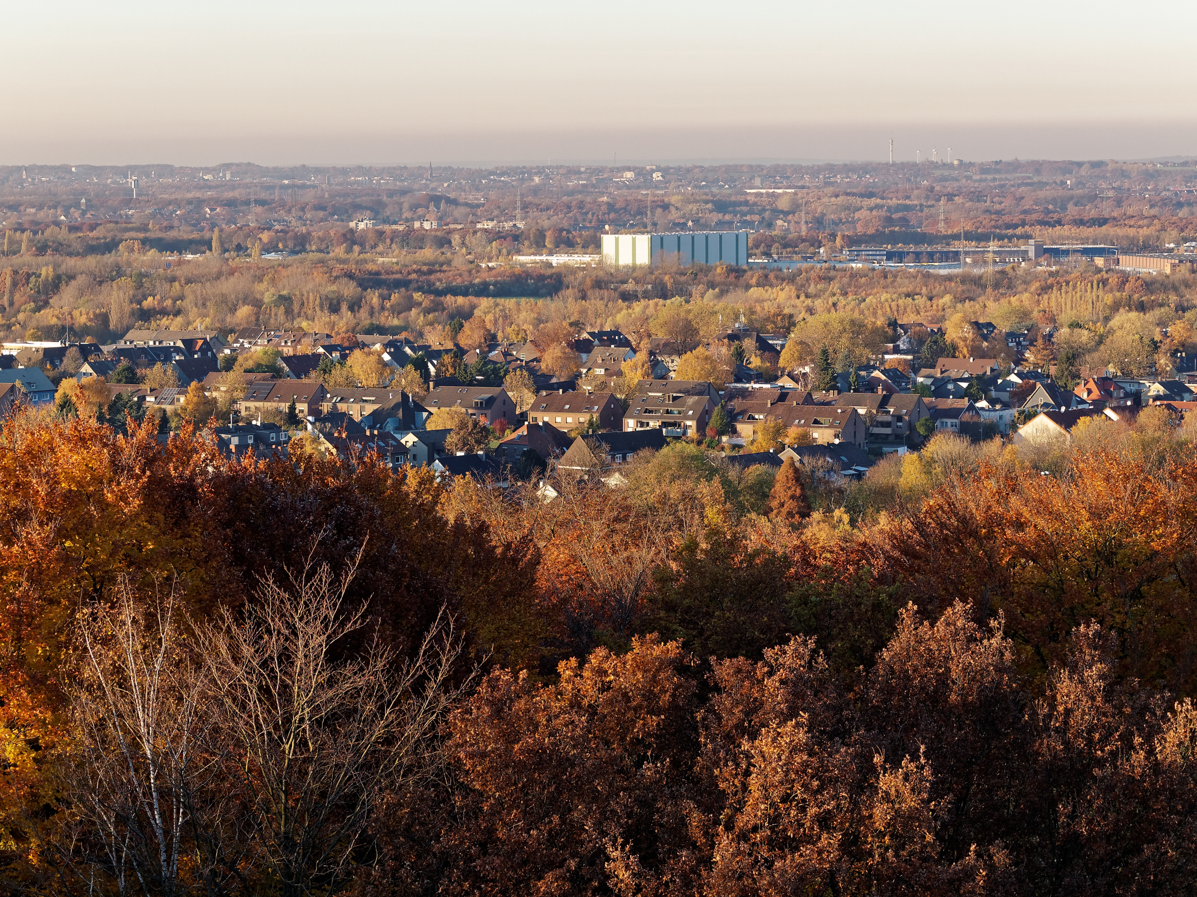 Blick vom Wilhelmturm nach Nordnordwesten auf das südliche Herne-Börnig mit den Häusern Am Kornfeld, dahinter und tiefer der alte Ortskern von Börnig. Dahinter das Industriegebiet der ehemaligen Zeche Friedrich der Große mit vielen Logistikfirmen wie UPS, Dachser und Phönix Arzneimittellogistik